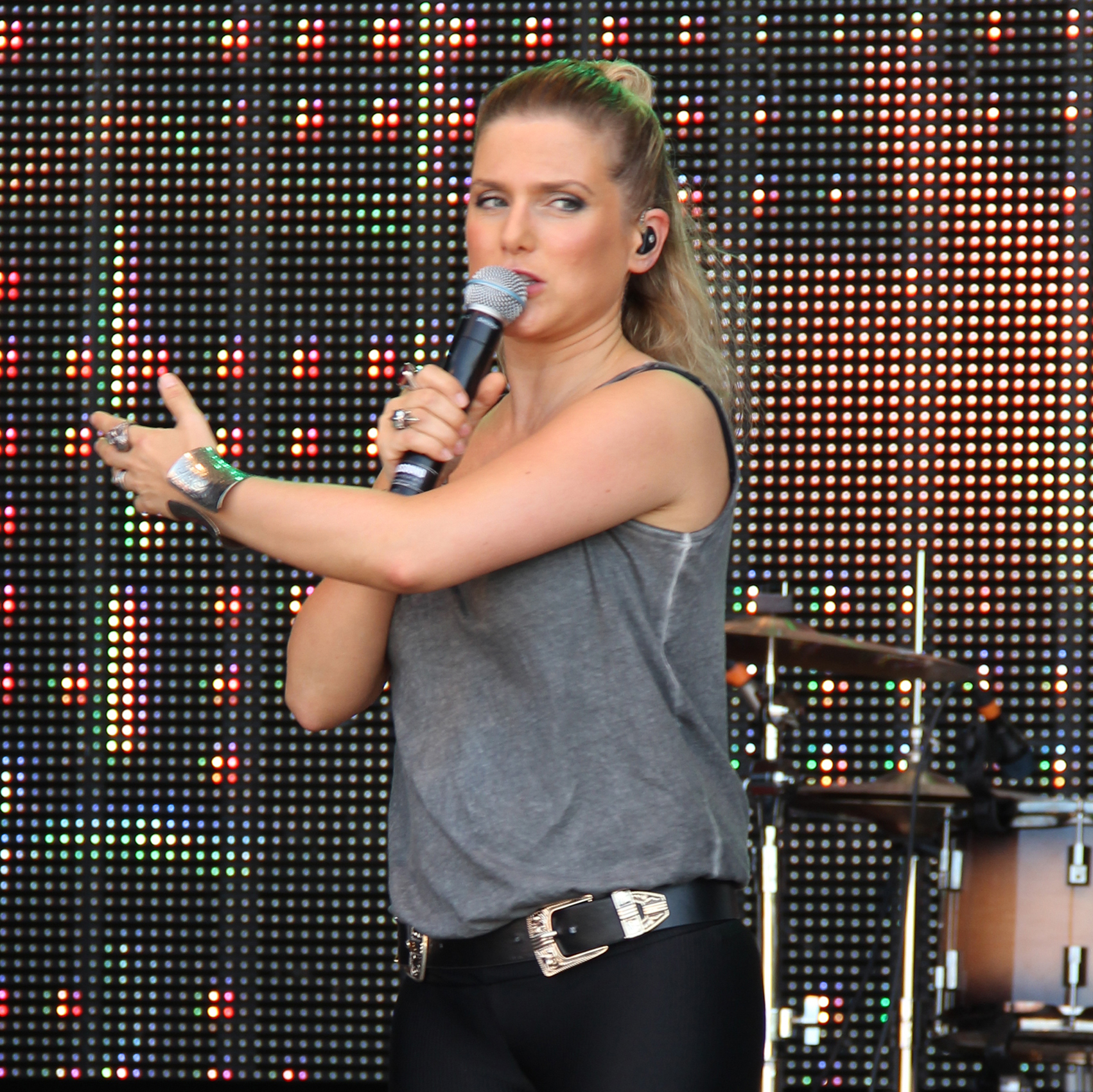 Jeanette Biedermann tritt mit ihrer Band Ewig bei REWE Family am 09.07.2016 auf dem Cannstatter Wasen in Stuttgart auf.